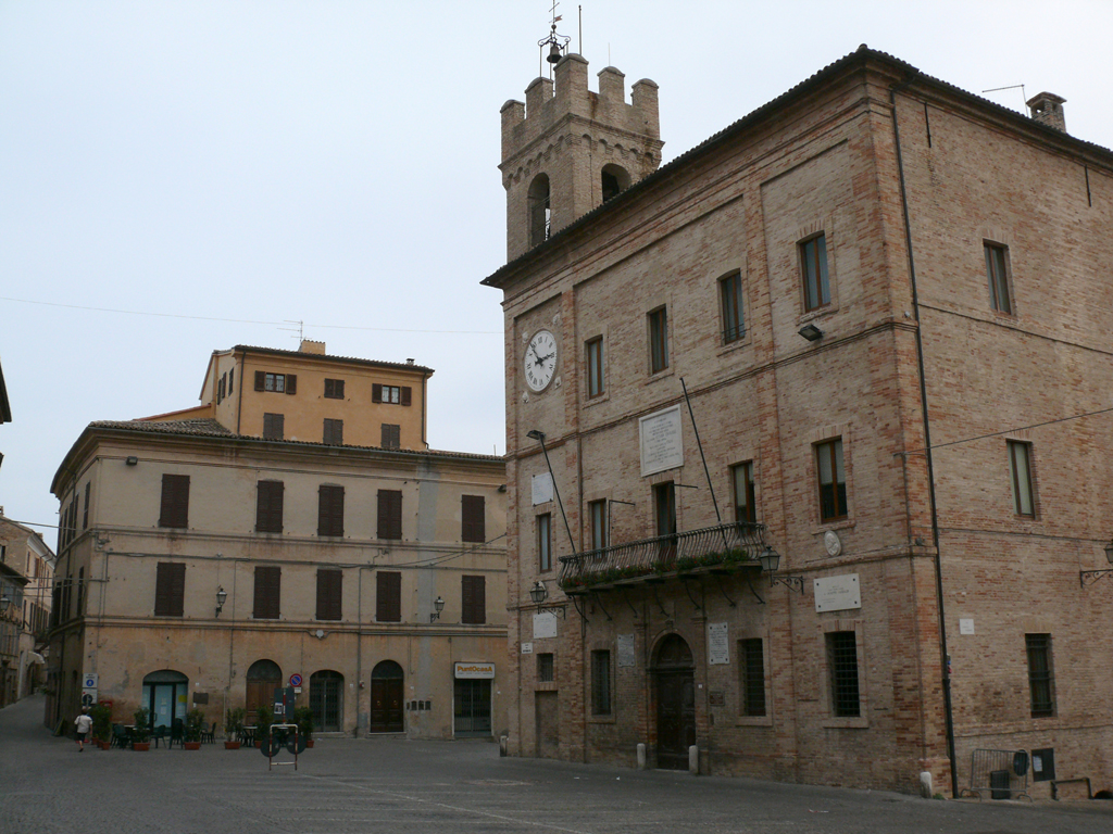 Castelfidardo, Museo internazionale della Fisarmonica